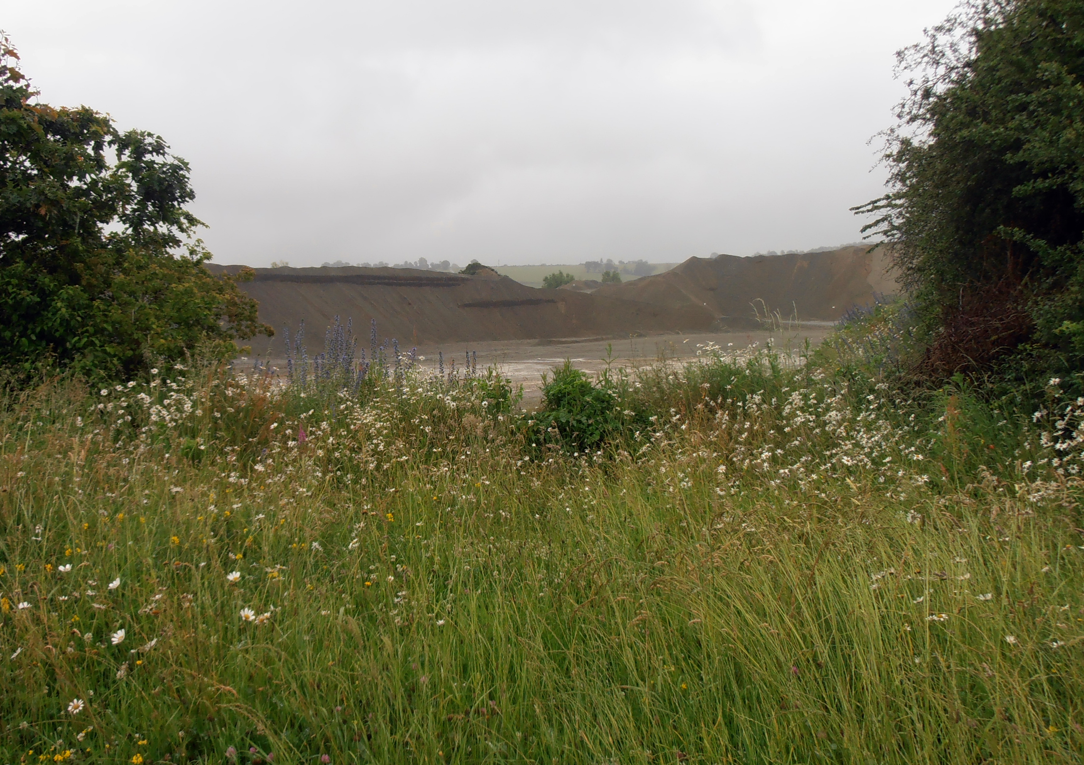 Carrière de la Kabylie, Voutré, Mayenne, France